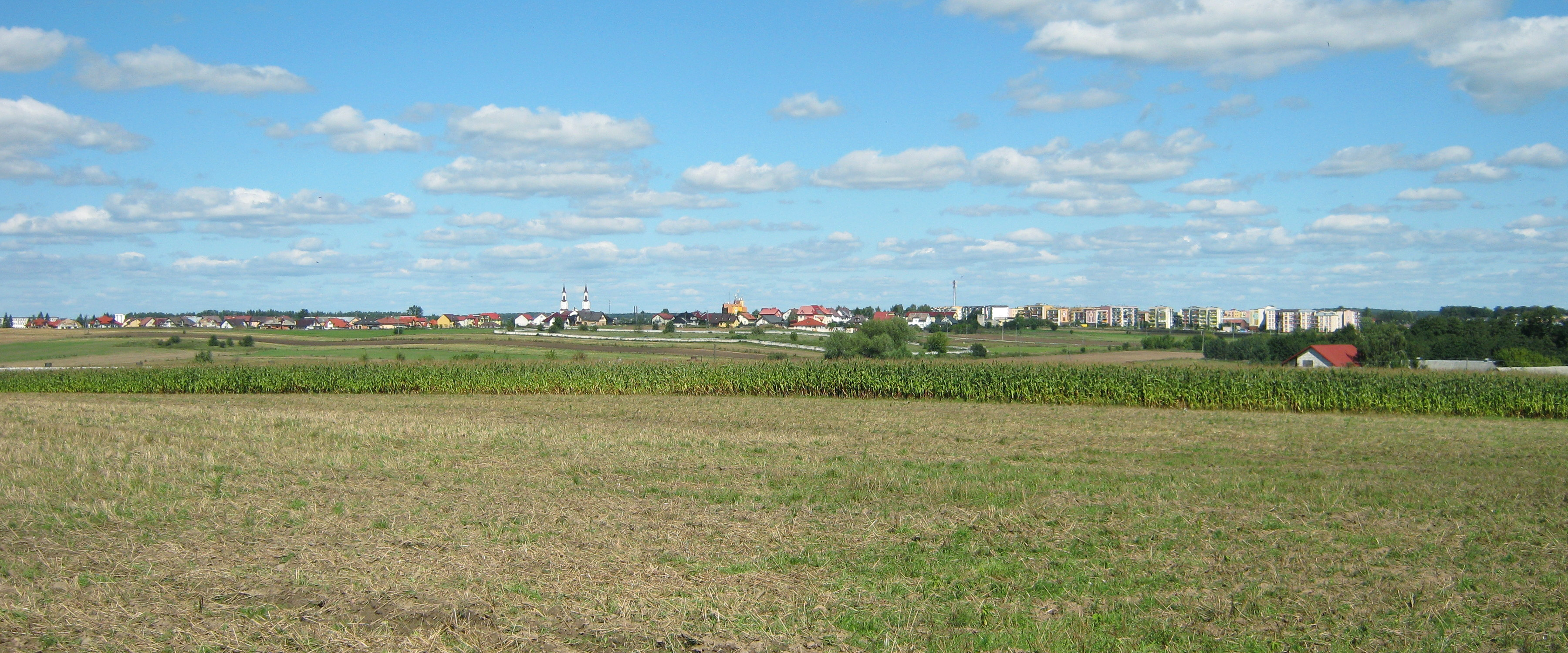 Kolno zachód